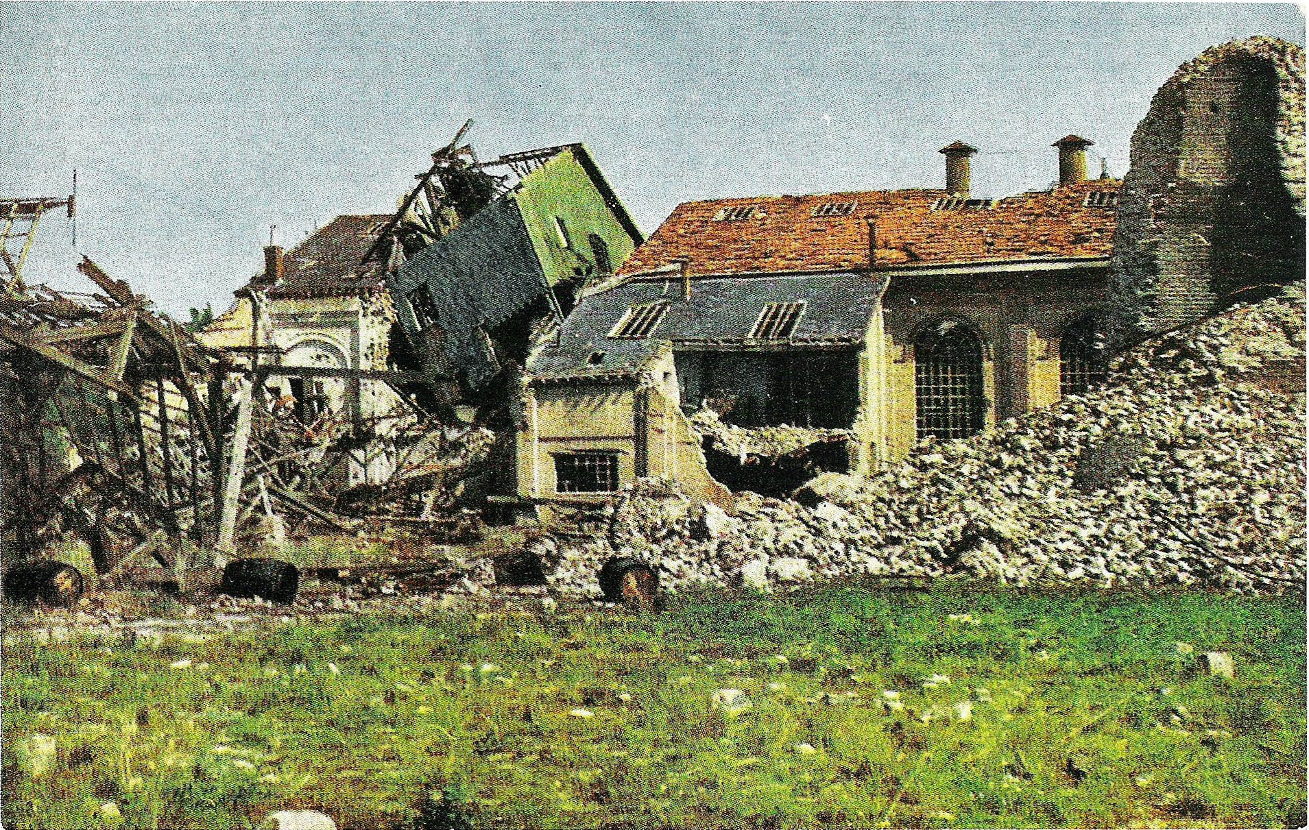 Loivre_sucrerie_1915_Carte_postale.